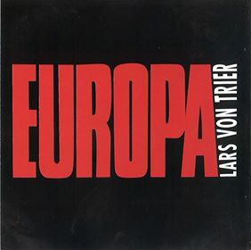 Заставка фильма 1991 года «Европа».